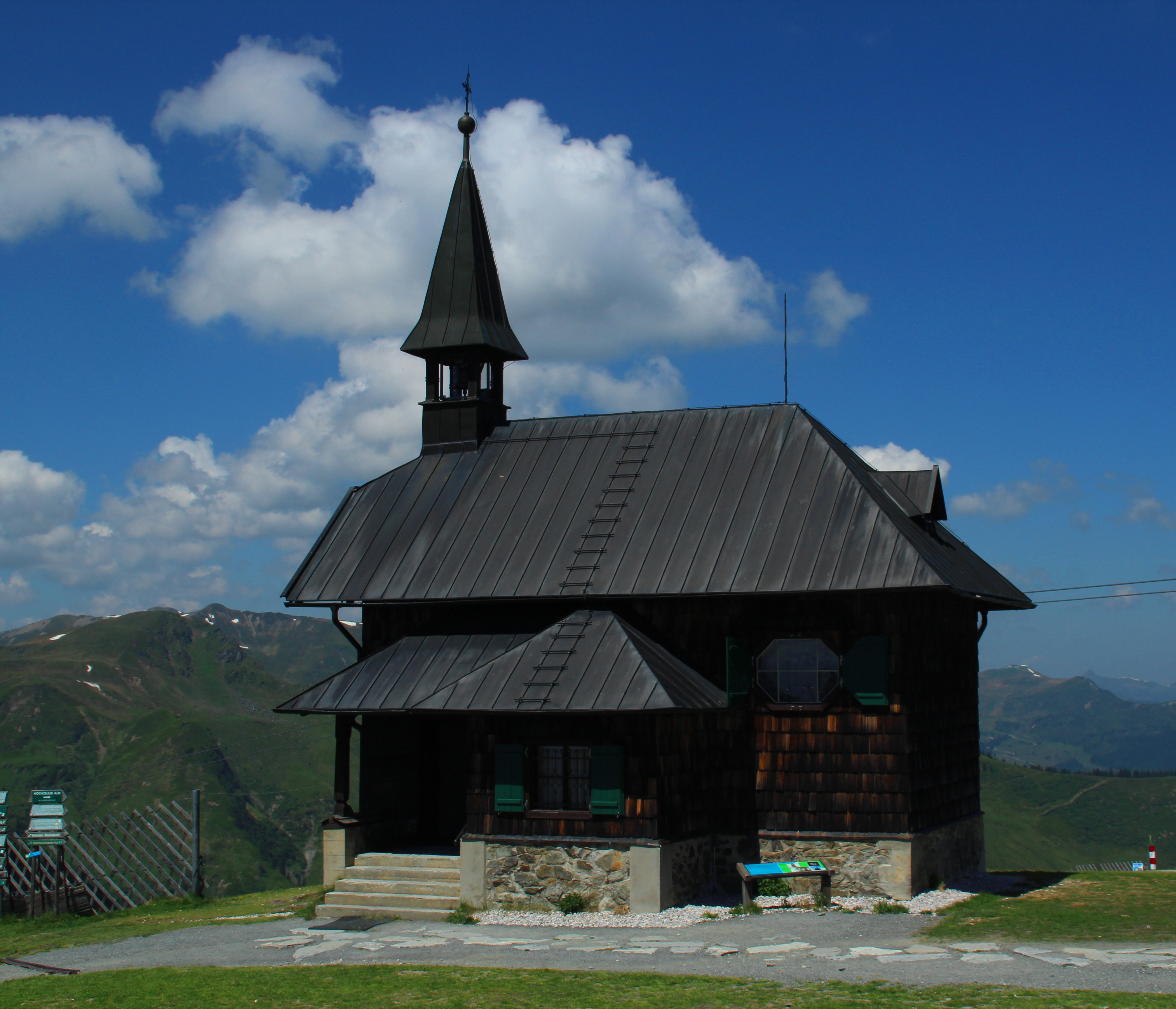 Elisabethkapelle (1908) auf der Schmittenhöhe